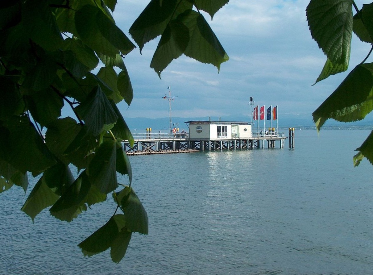 Bootsanleger in Hagnau am Bodensee